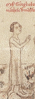 Guillaume VII de Montferrat